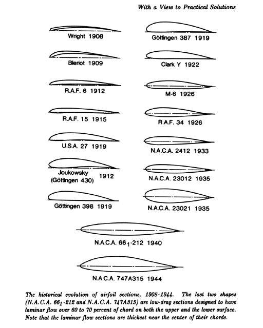 Die geleidelike ontwikkeling van vlerkprofiele, 1908 - 1944, NASA.